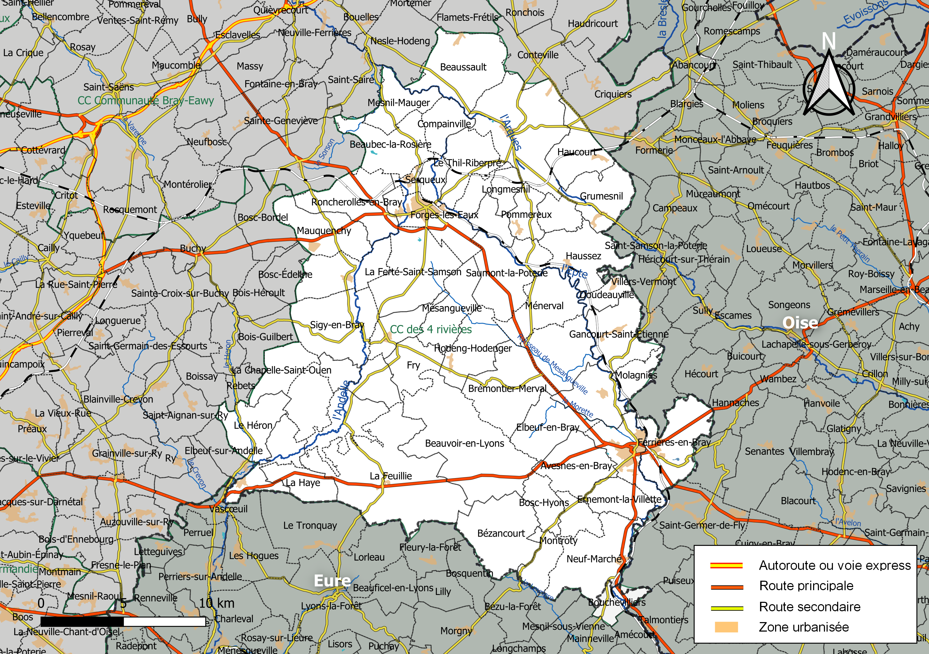 Carte géographique de la Communauté de communes des 4 rivières, département de la Seine-Maritime, France. Composition au 1er janvier 2019.